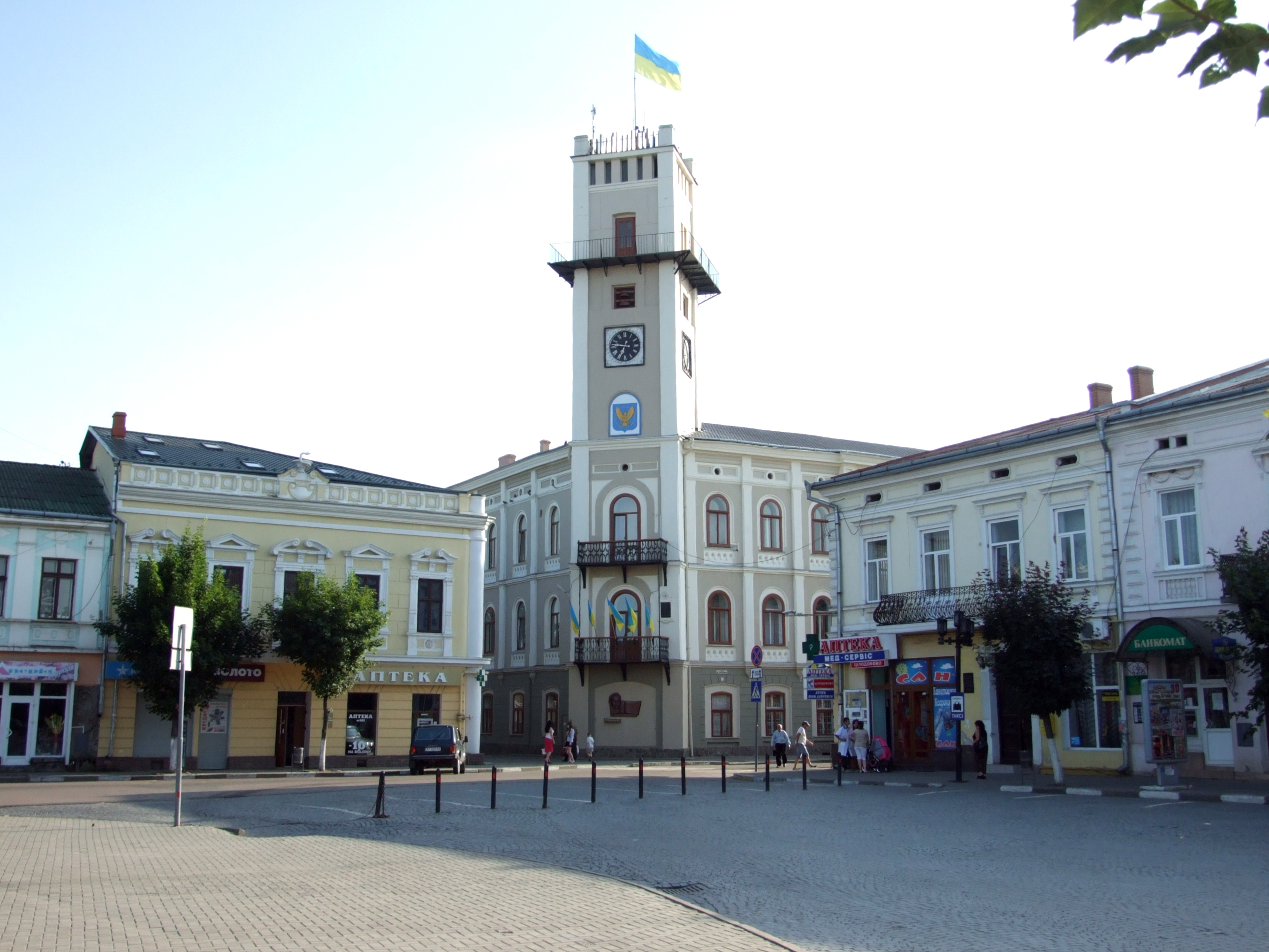 Ратуша, 1877 р.